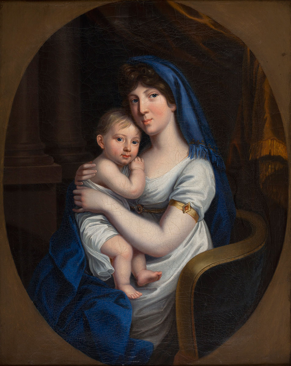 Porträt Marie von Baden mit Kind